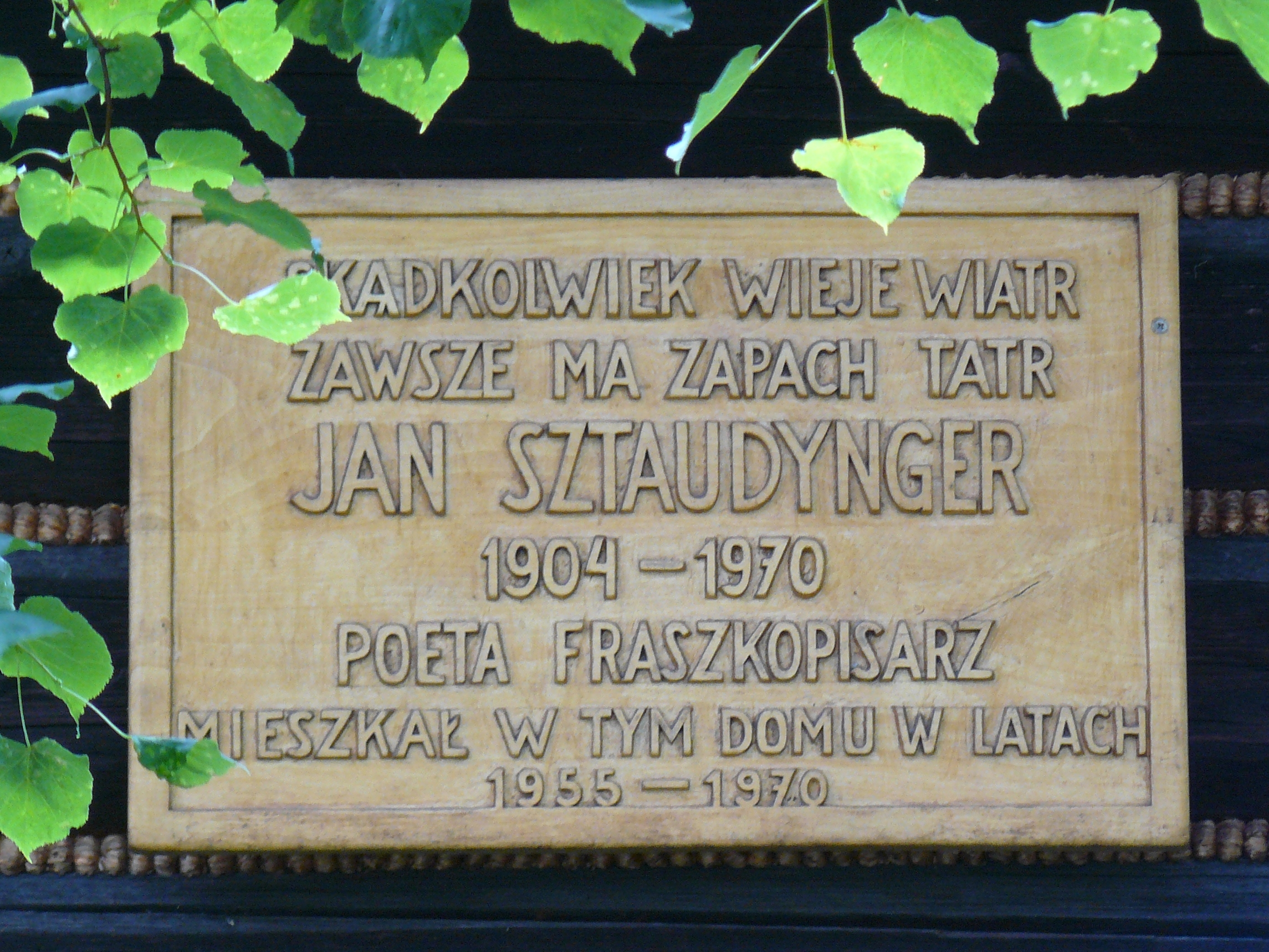 Tablica na domu w Zakopanem przy ulicy Piłsudskiego 69 gdzie mieszkał Jan Sztaudynger.